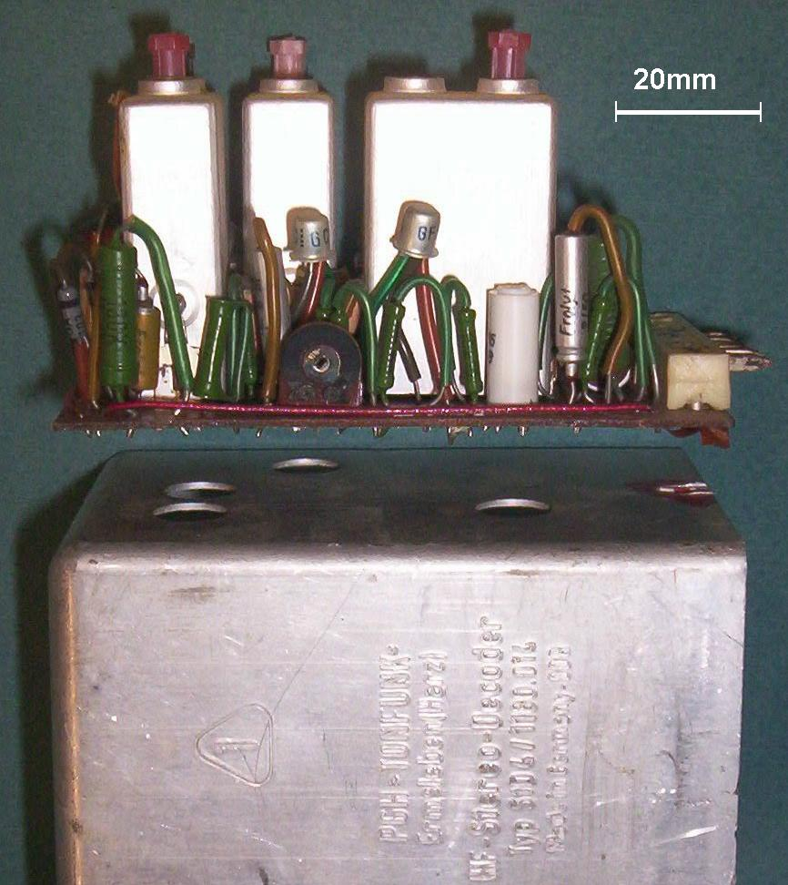 Mit Gemaniumtransistoren bestückter Stereodecoder und zugehöriges Gehäuse (Fa. PGH Tonfunk Ermsleben/Harz, ca. 1968) andere Versionen